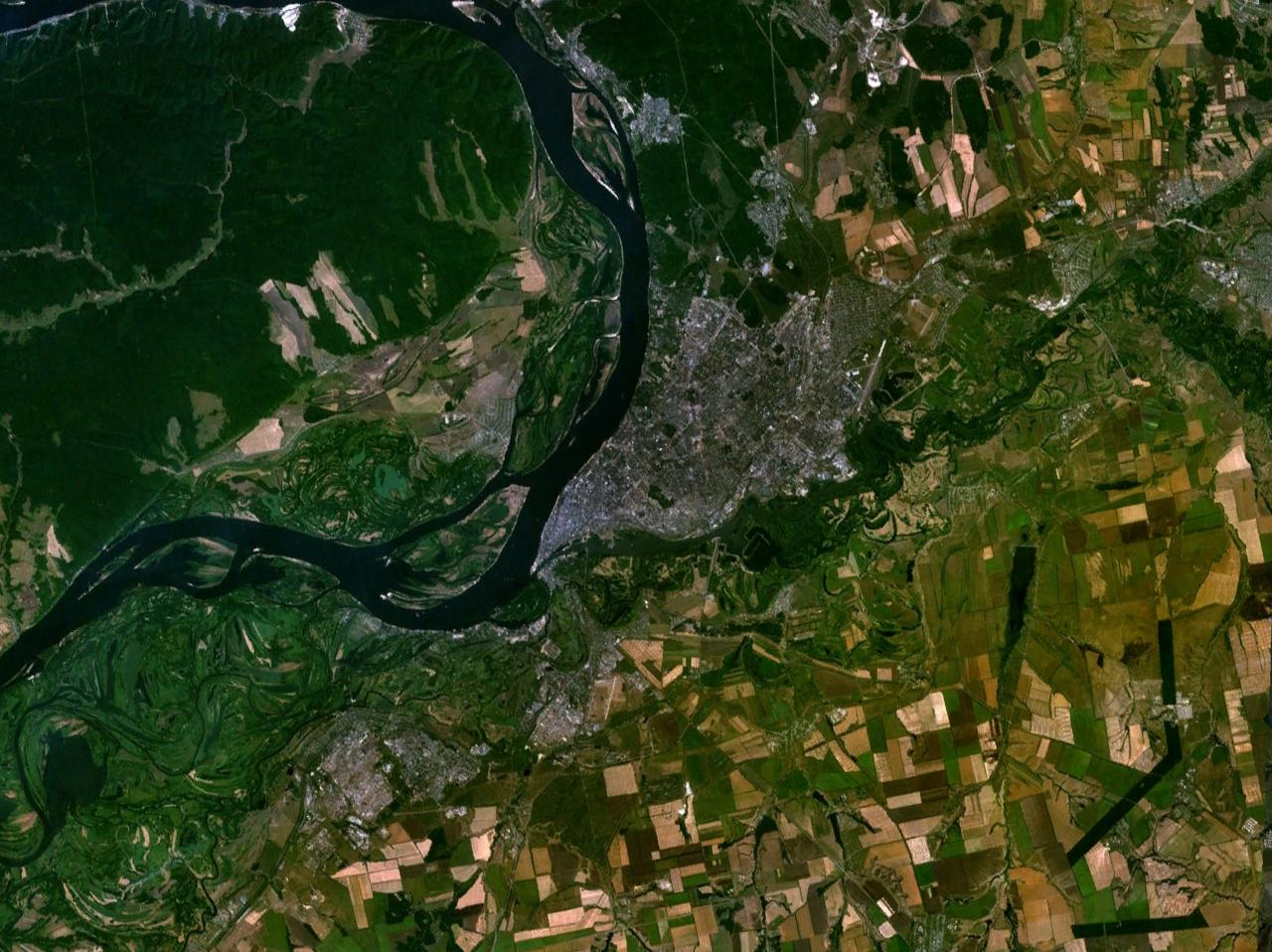 Samara, Russia